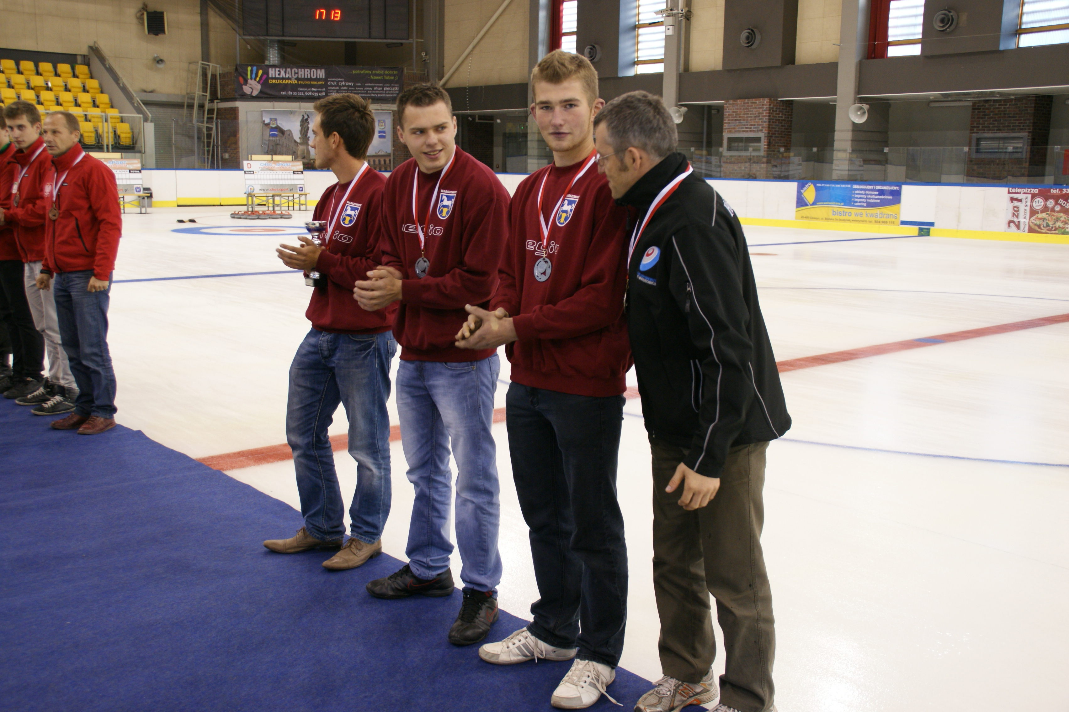 Niepelny sklad. Od prawej: D. Herman (t), P. Gronowski, S. Klimza, J. Rokita (s).